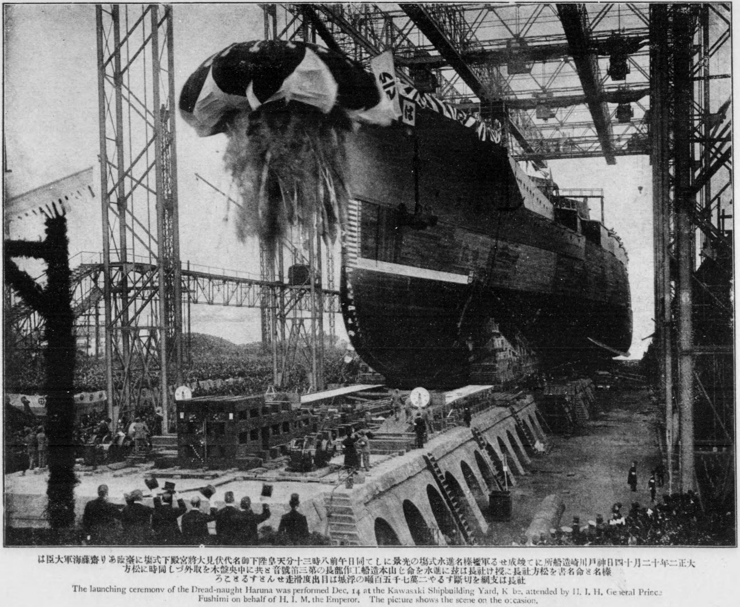 1913年（大正2年）12月14日、戦艦榛名進水式